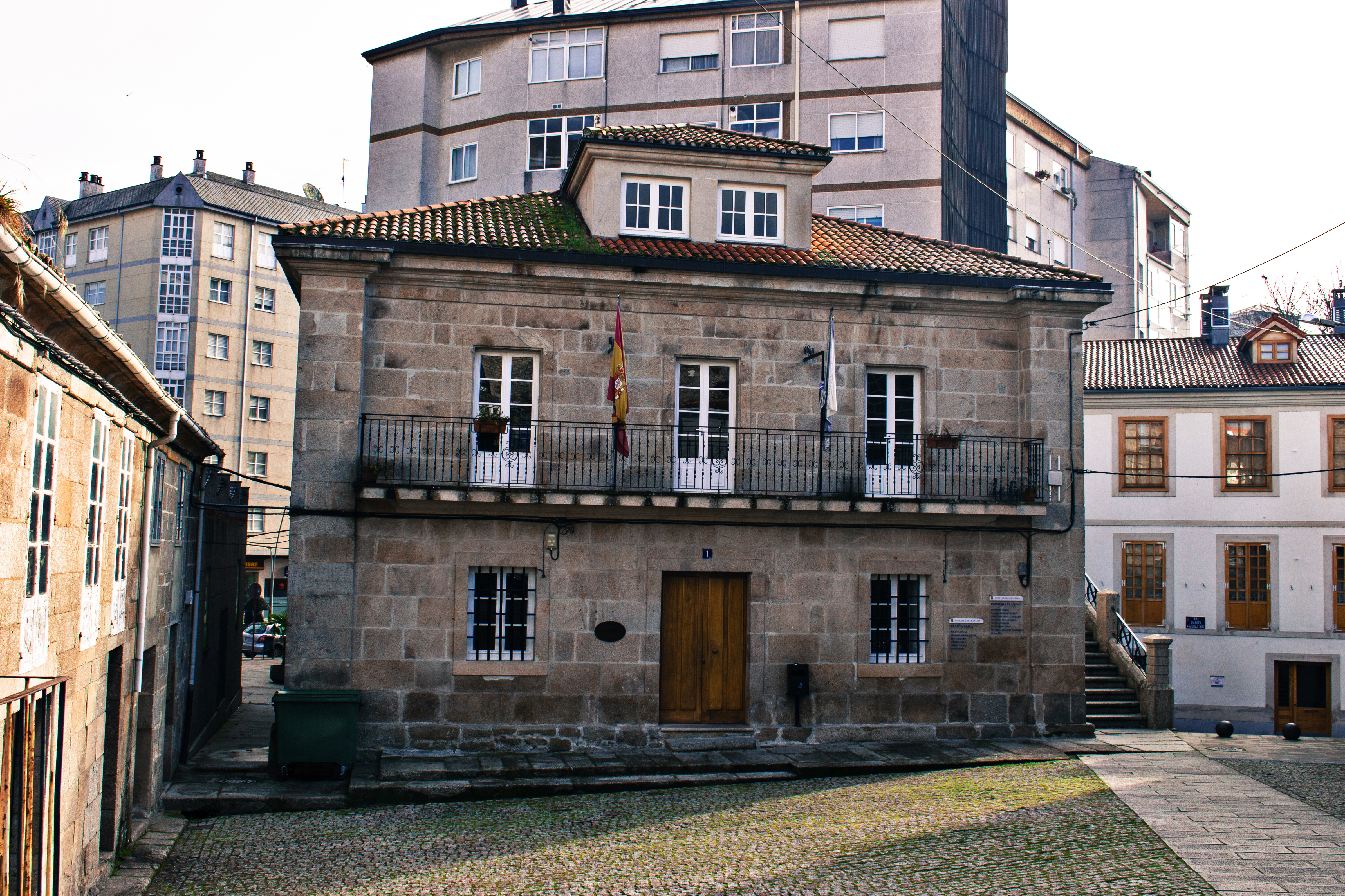 Casa do concello de Chantada.